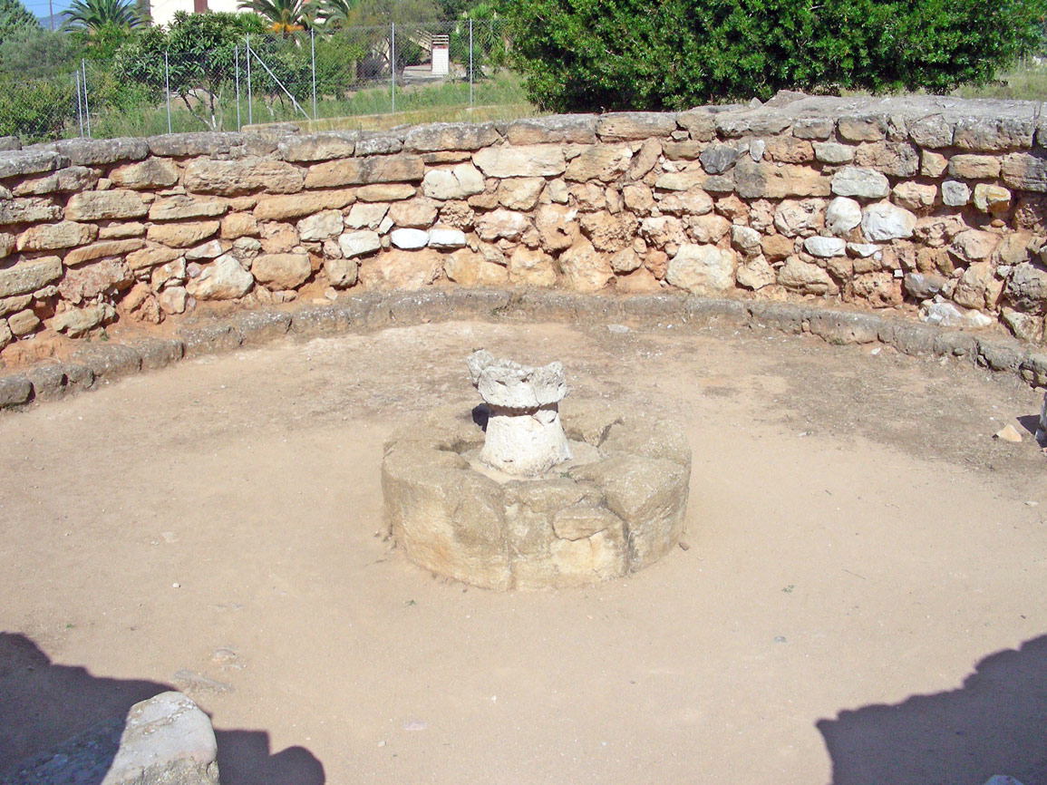 Italia, Sardegna, provincia di Sassari, Alghero, nuraghe e villaggio nuragico di Palmavera, recinto esterno del nuraghe, parte "pubblica", capanna delle riunioni, vista dell'interno dalla porta di accesso